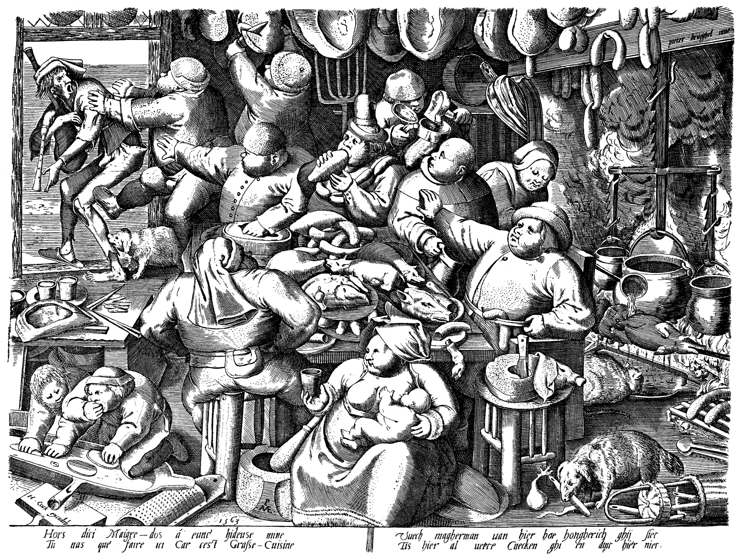 Pieter Bruegel der Ältere: Die fette Küche, (1563), 22,5 × 29 cm, Kupferstich, Bibliothèque Royale, Cabinet Estampesin Brüssel